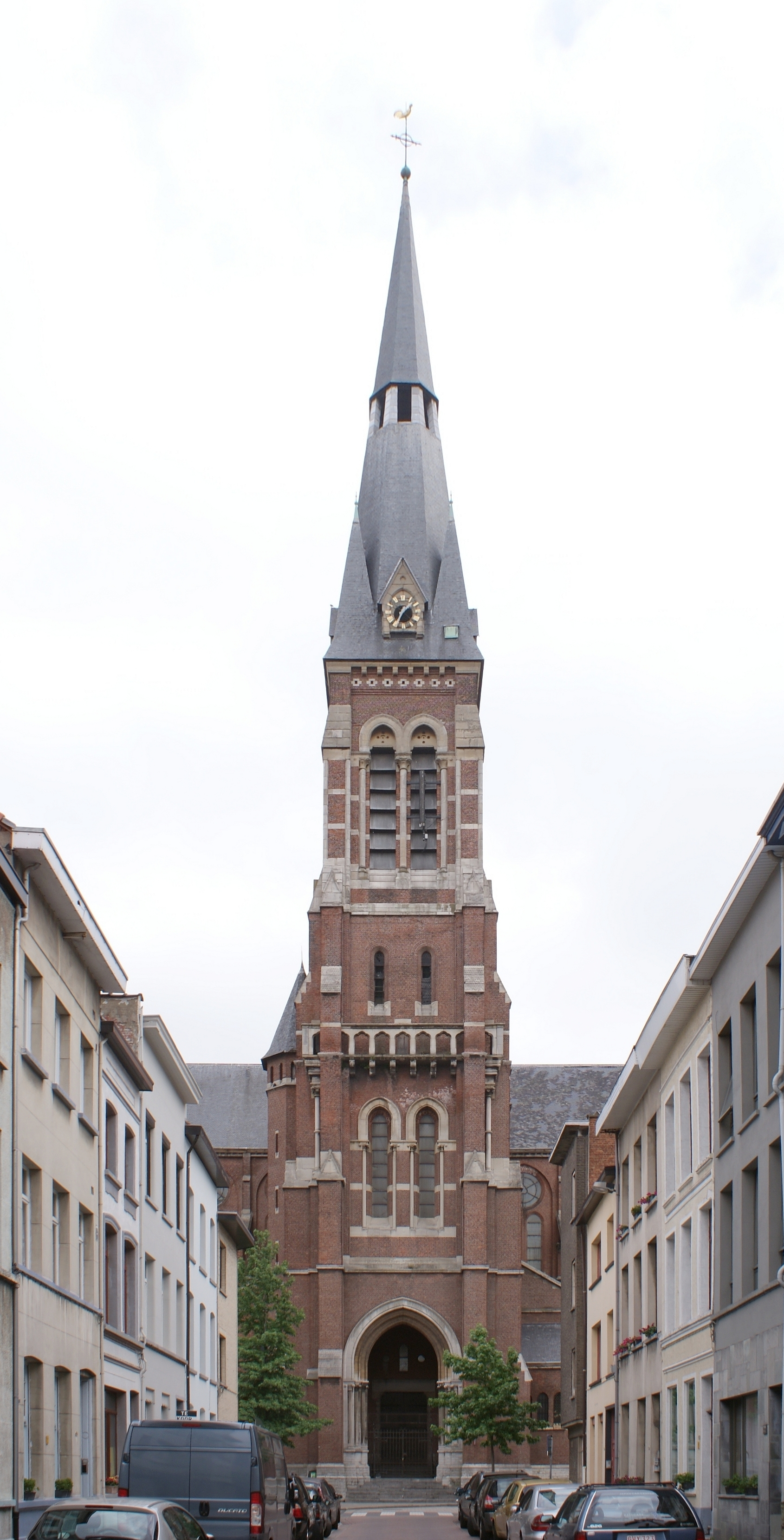 Sint-Amanduskerk - Antwerpen (Seefhoek) - Toren